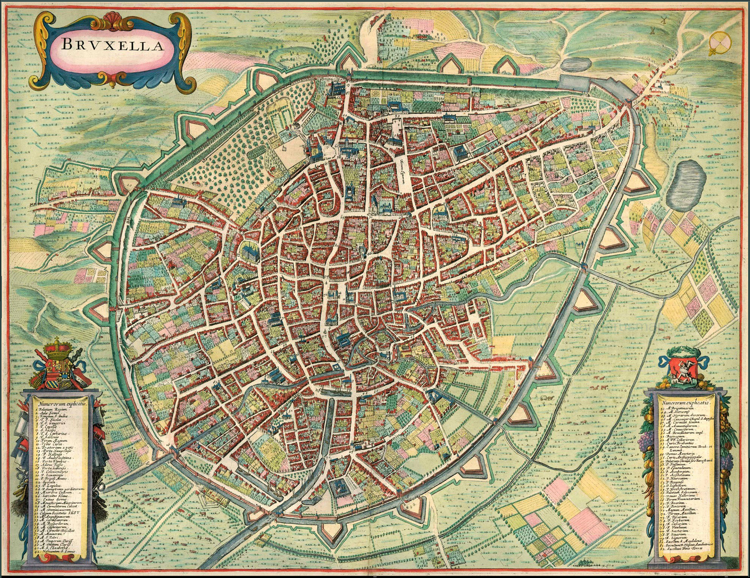 17de eeuwse stadsplattegrond van Brussel door Janssonius. Grote gelijkenis met de kaart van Blaeu